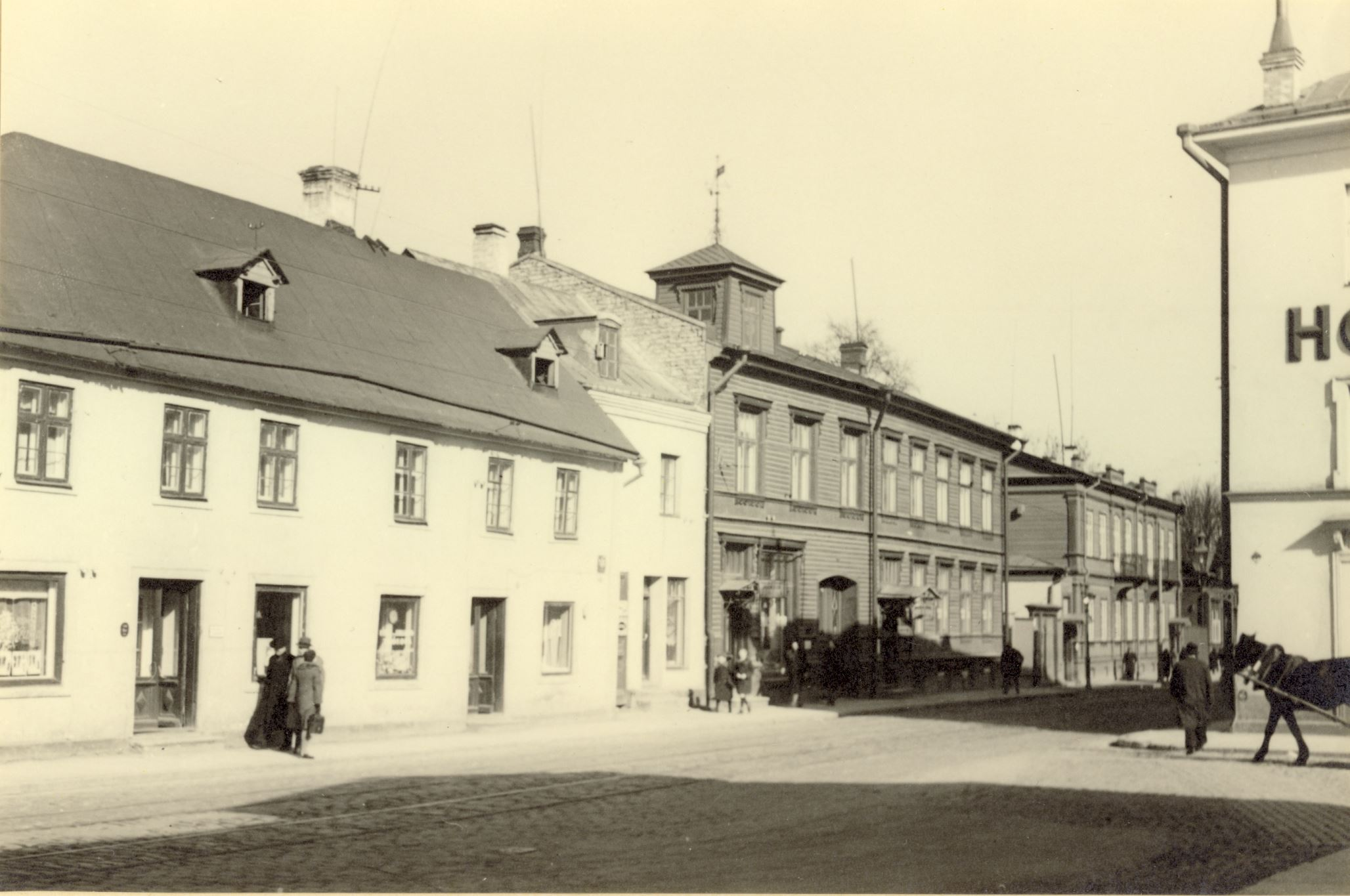 Narva mnt 21